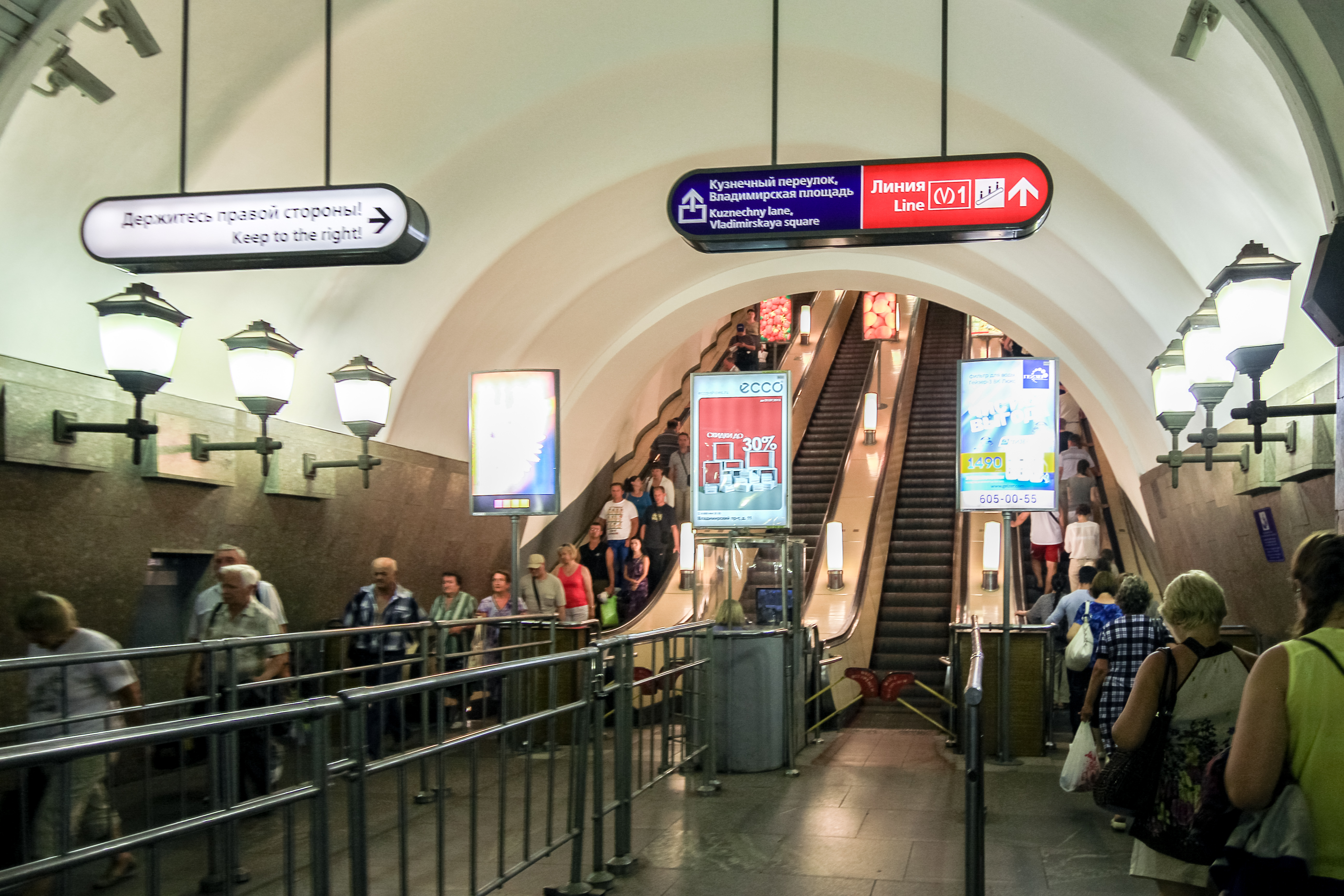 Достоевская (станция метро, Санкт-Петербург)